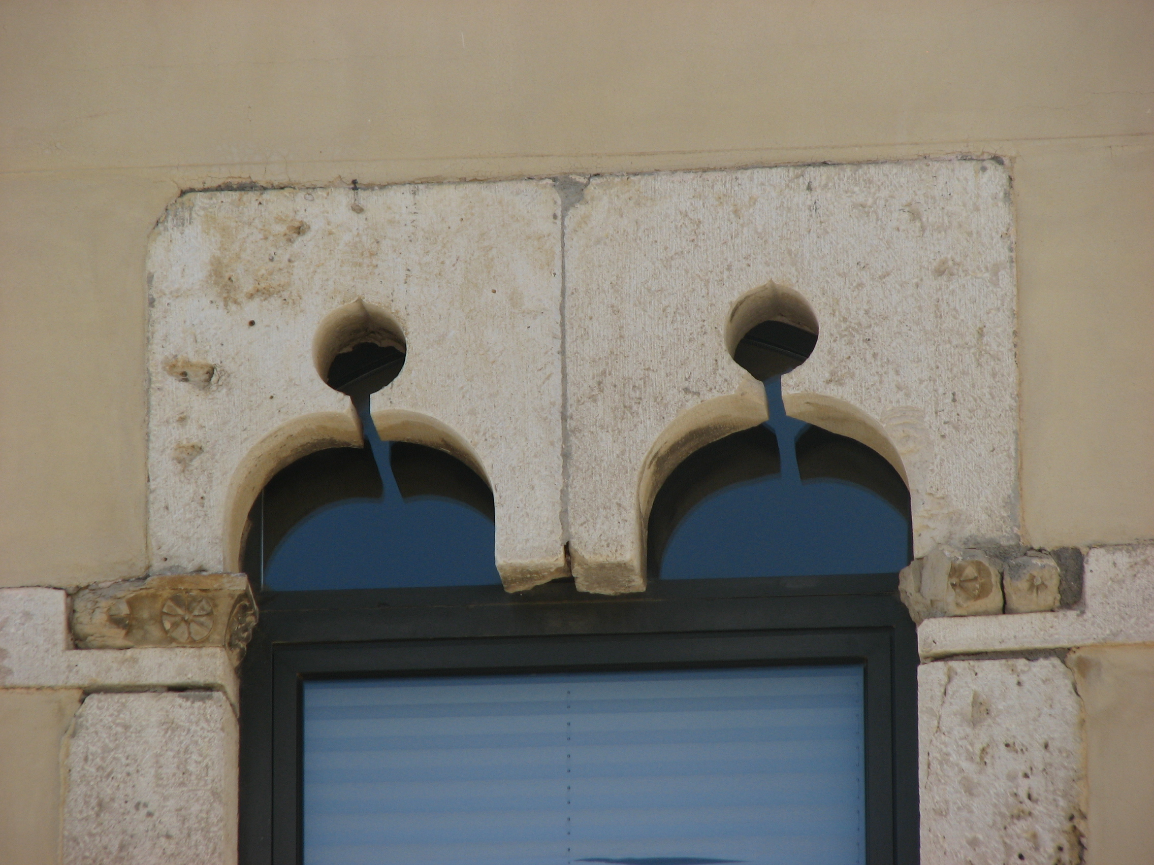 Can Puig de la Bellacasa (Banyoles)